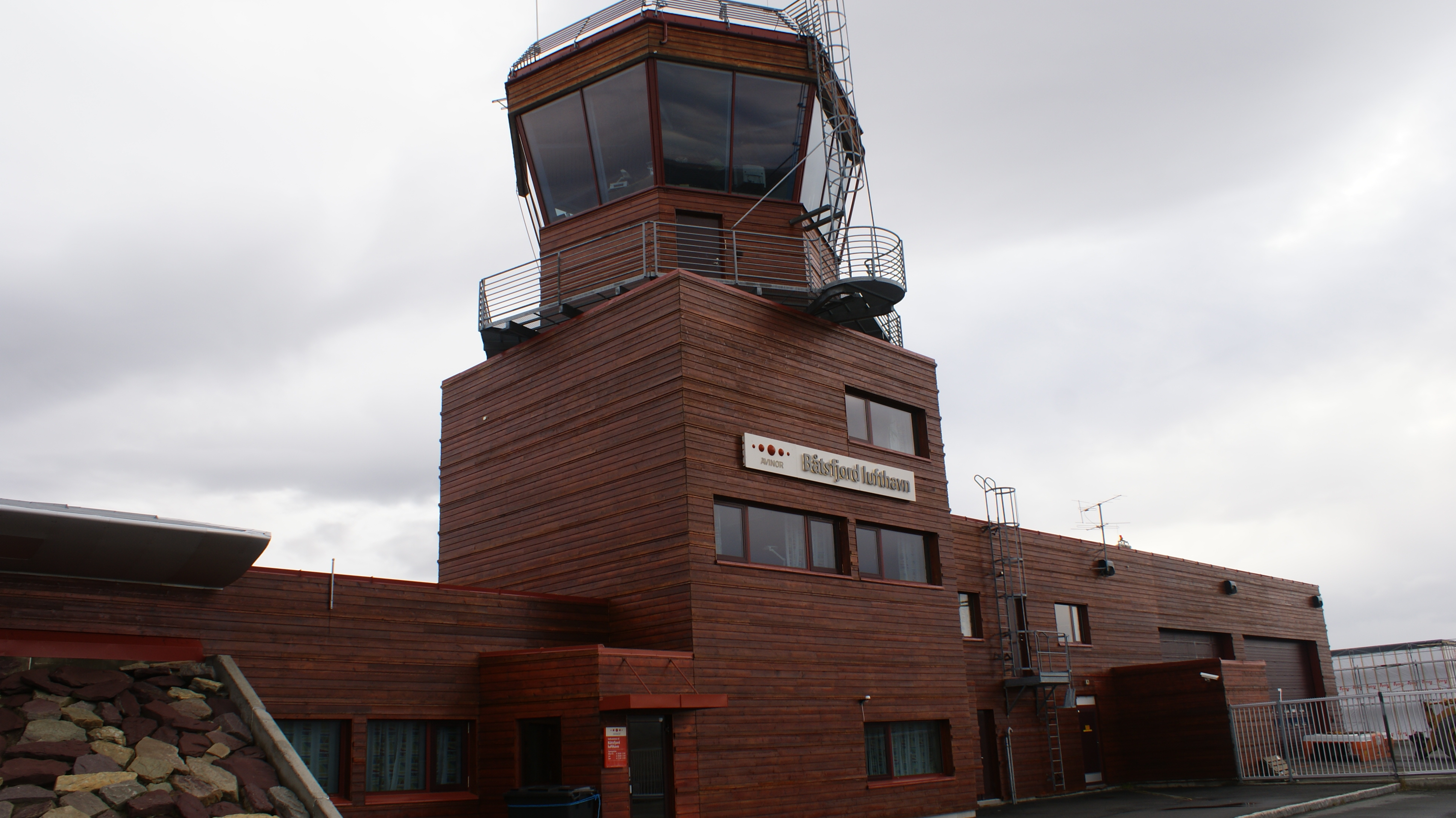 Båtsfjord Airport, Varangerhalvøya, Finnmark, Norway.